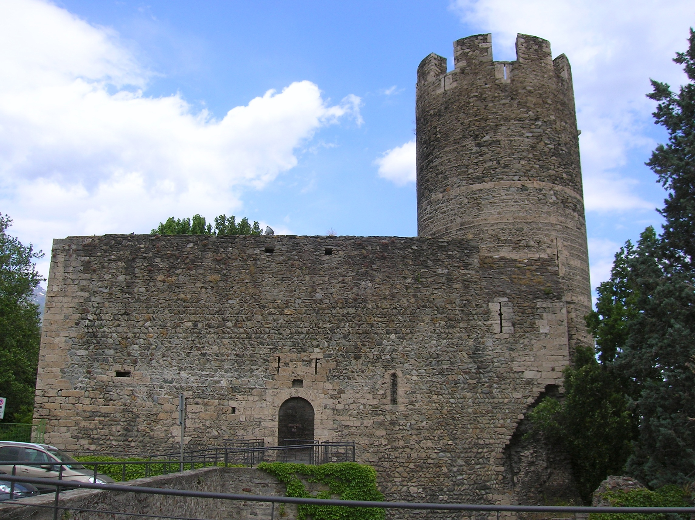 Castello di Bramafam, Aosta, Valle d'Aosta, Italia.